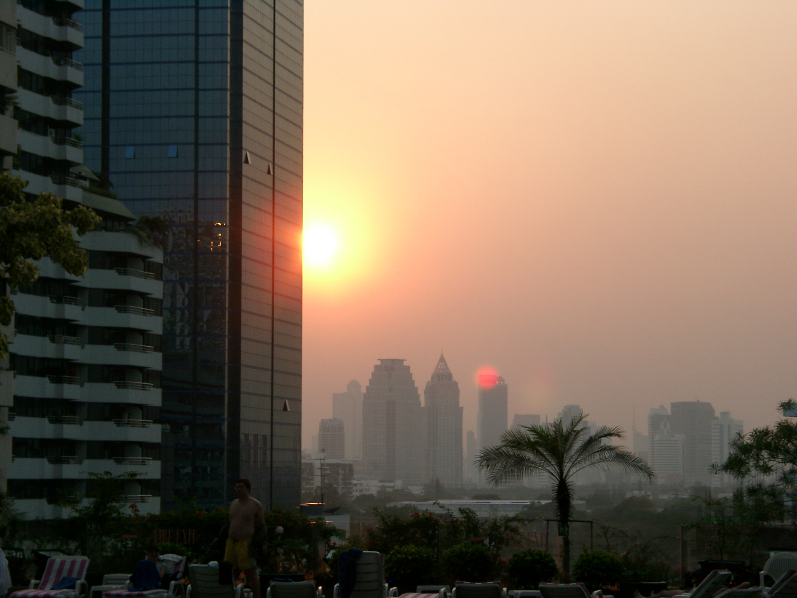 Bangkok an einem Sonntag